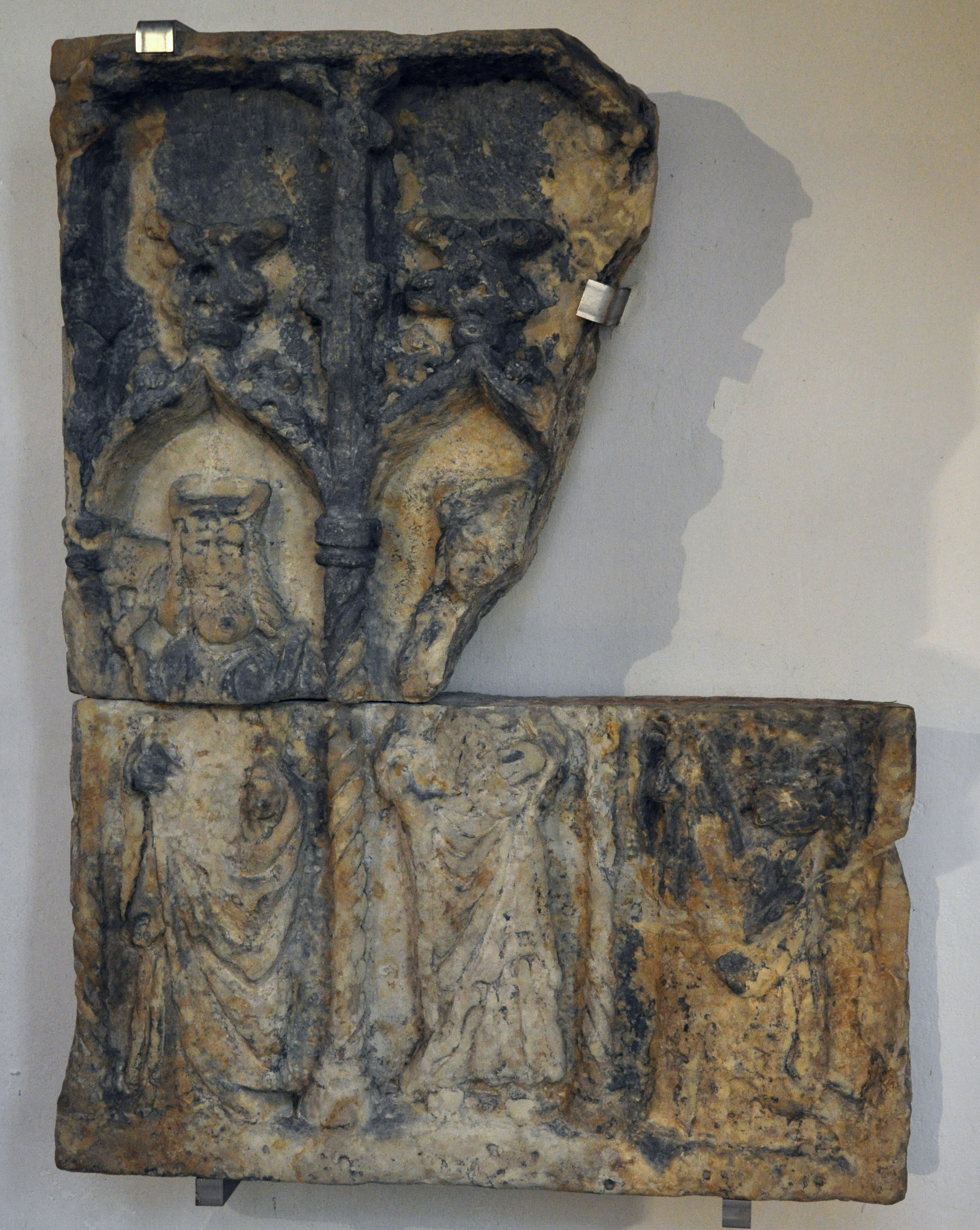 Hannover, Gartenkirche, Relief aus der alten Marienkapelle, nach 1490; links: hl. Chrysogonus, Mitte: hl. Katharina, rechts: hl. Konrad von Konstanz